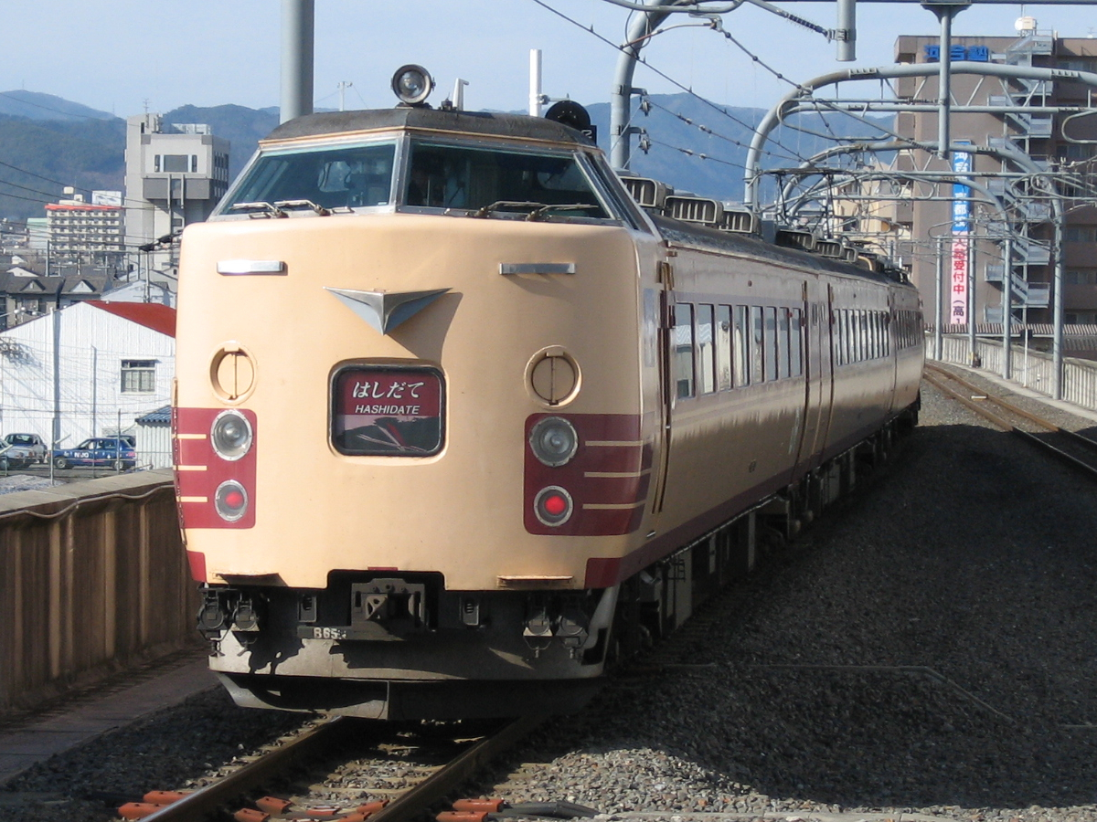 西日本旅客鉄道183系特急はしだて